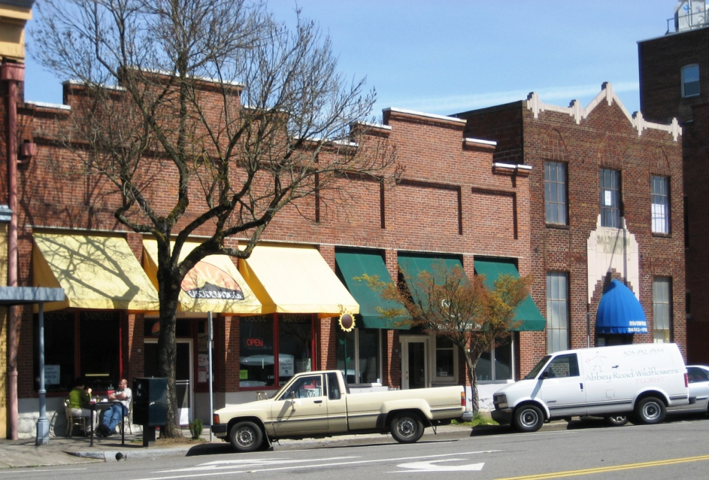 Old Building in Salem, OR